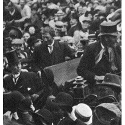 Cook acclamato dalla folla al suo arrivo a Copenaghen